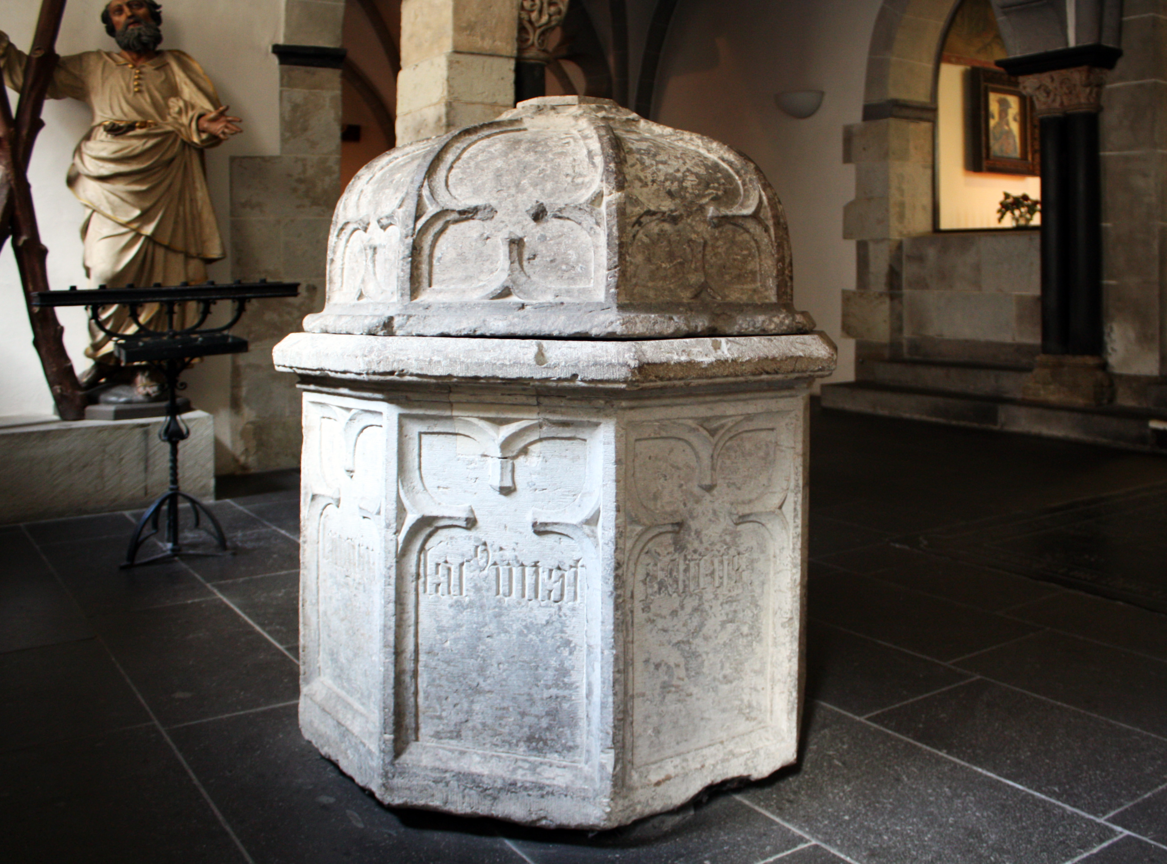 Der sogenannte „Blutbrunnen“, ein ehemaliges Reliquiar, steht im Zusammenhang mit dem Kult des Martyriums der 11000 Jungfrauen, der außer im Stift St. Ursula auch bei den Benediktinerinnen des Klosters zu den heiligen Machabäern besonders sehr ausgeprägt war.